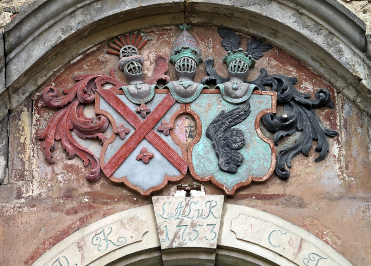 Schloss Hainewalde: Doppelwappen der Familien von Kanitz und von Kyaw über dem Südportal (Kleine Seite 31, Denkmal-Nr. 09271012, Sachgesamtheits-Nr. 09303345)